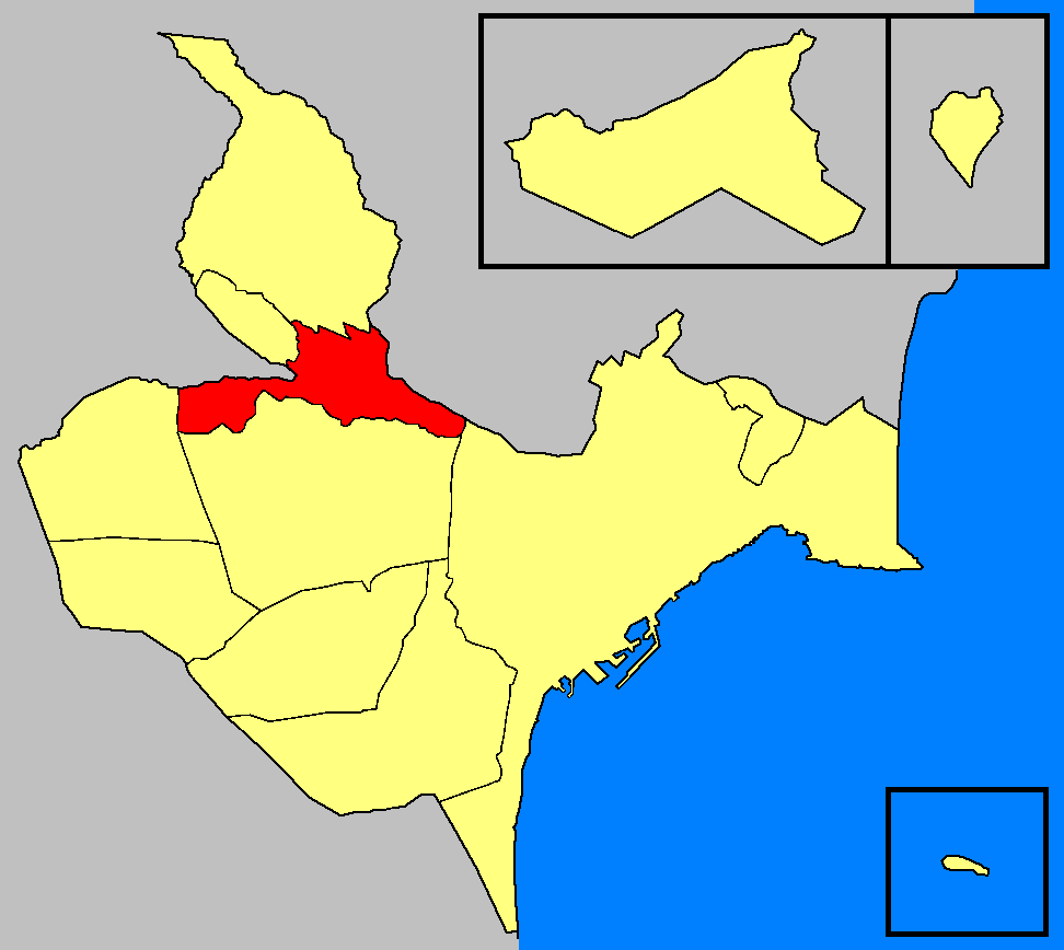 Entidades de población del término municipal de Alicante